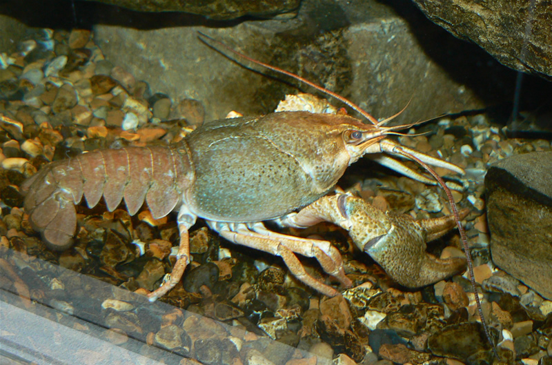 Narrow Clawed CrayfishNarrow clawed crayfish